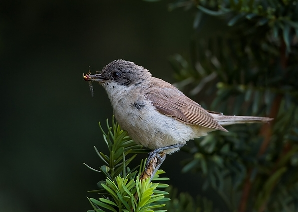 Sylvia curruca, Olomouc, CZ